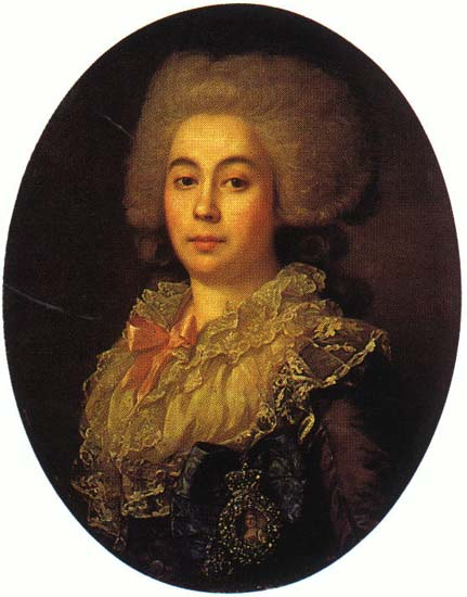 Протасова Анна Степановна (графиня) Автор: Вуаль Жан Луи Источник иллюстрации: Государственный Русский музей